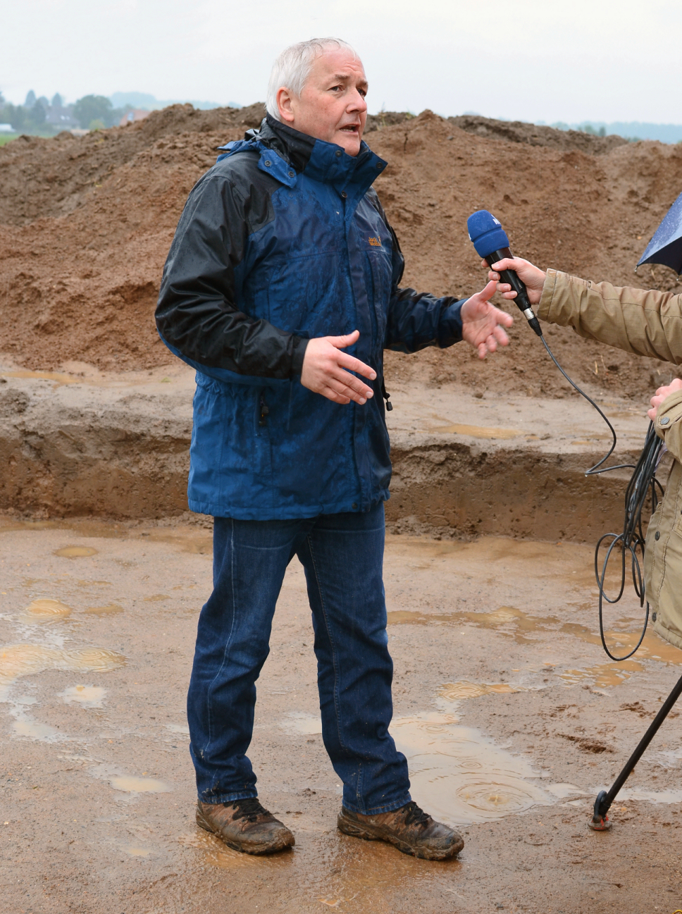 Henning Haßmann im Interview bei der Ausgrabung des römischen Marschlagers von Wilkenburg